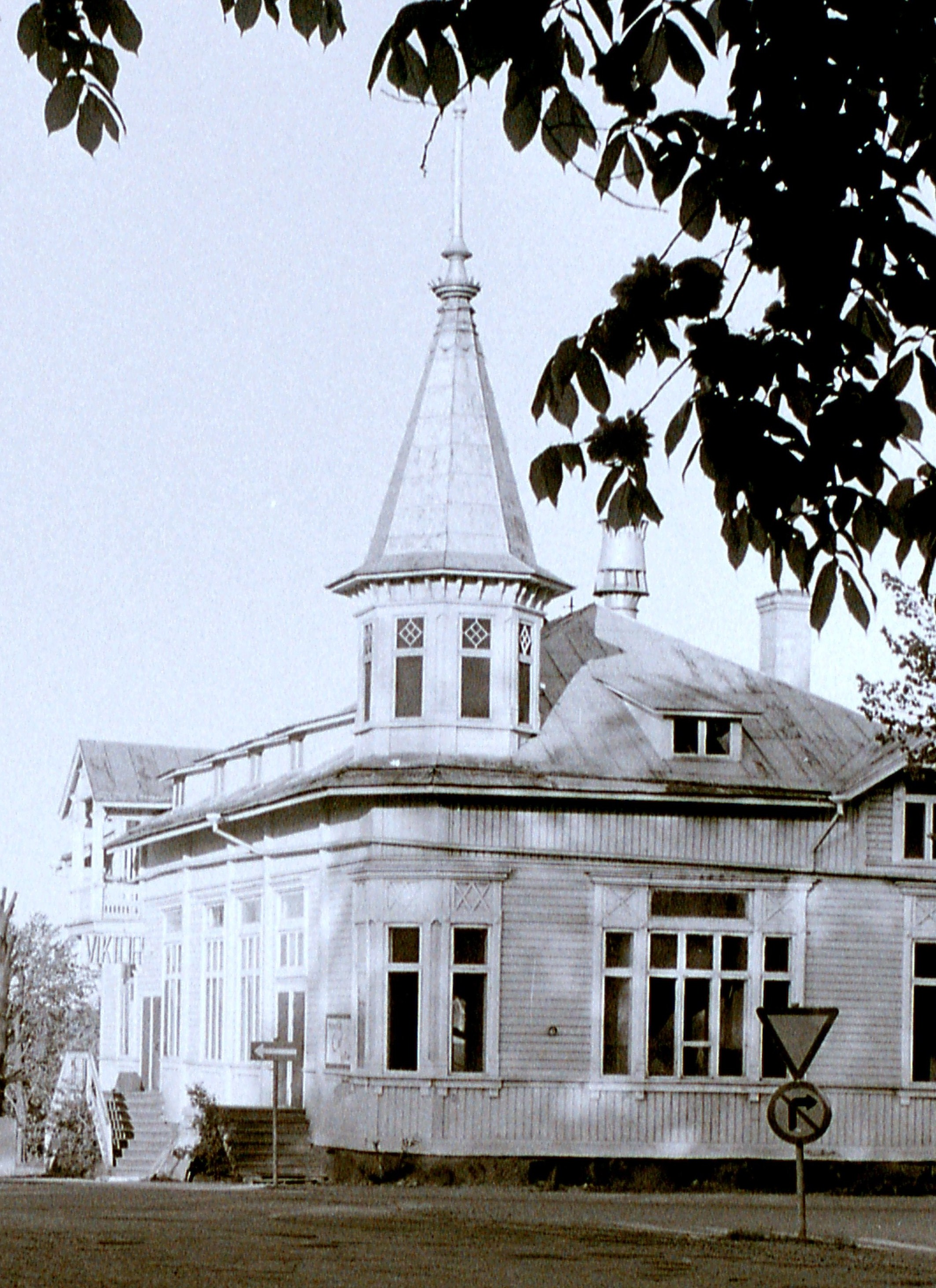 Foto 1974